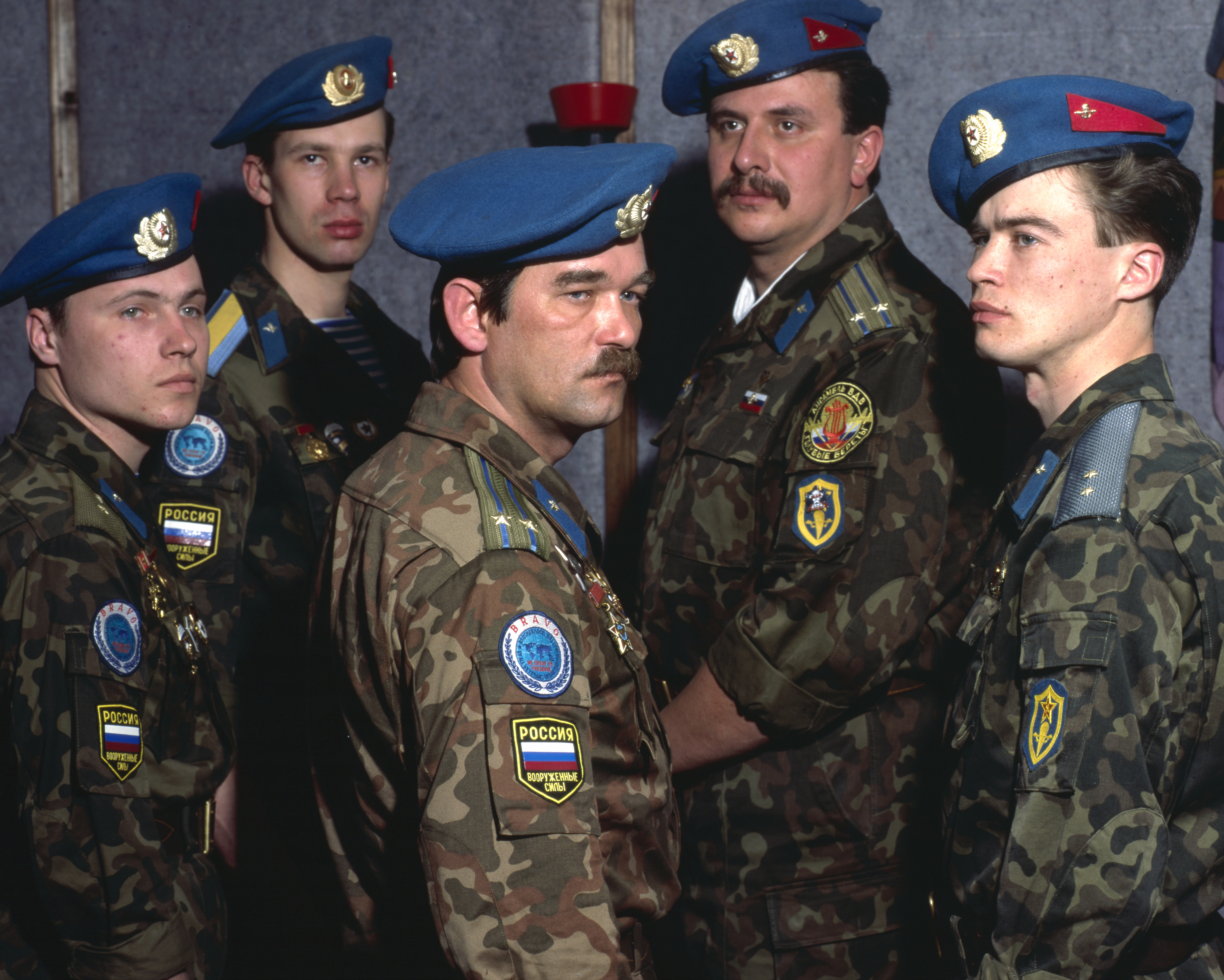 Пятый состав